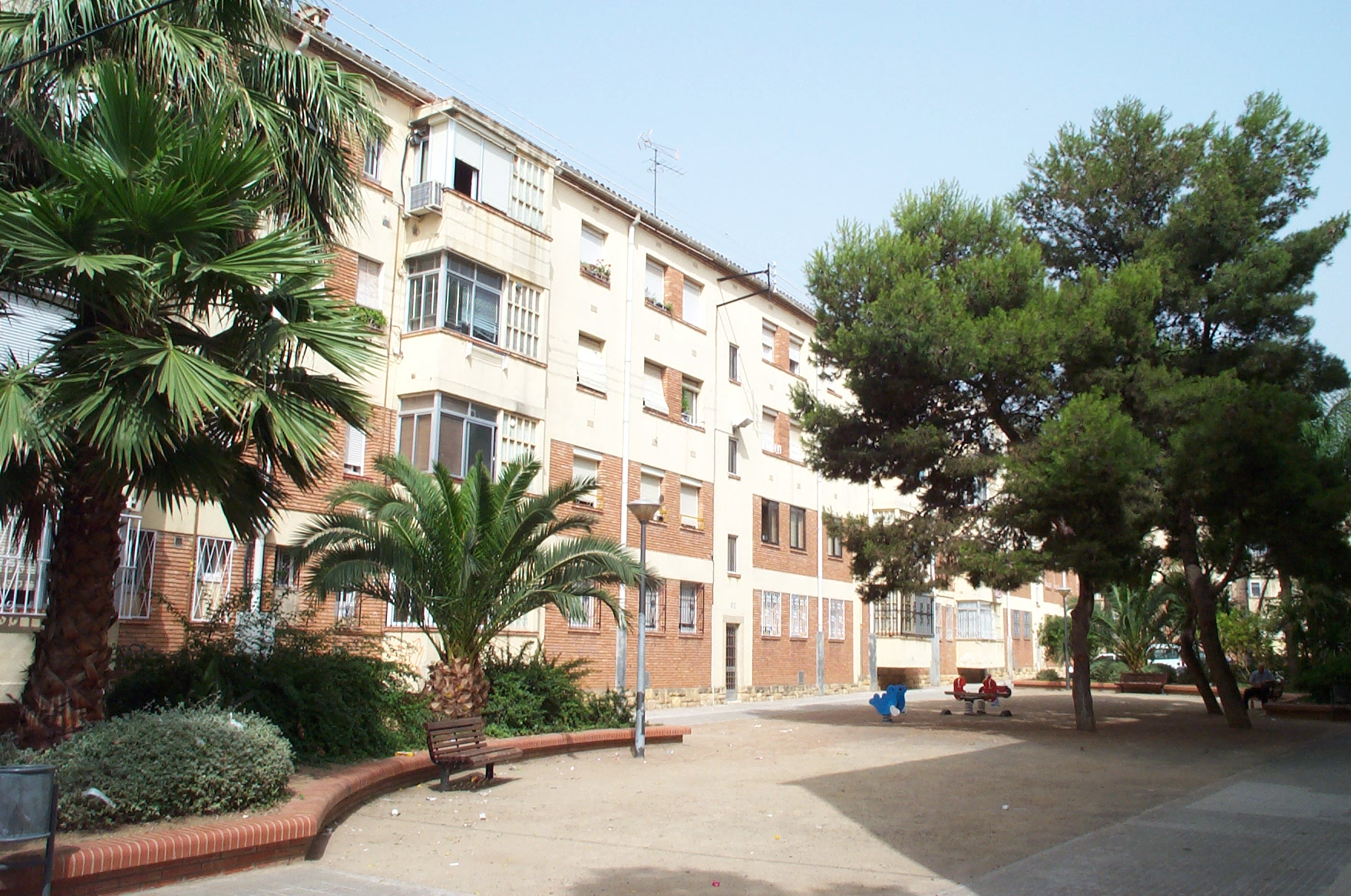 Barrio Fortuny de Reus